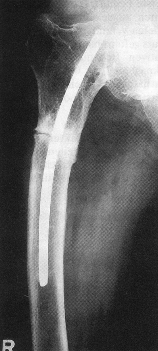 Röntgenbild vom rechten Oberschenkel einer 79-jährigen Patientin: im oberen Drittel des Femurs liegt einer der weltweit ersten Marknägel, entwickelt und eingebaut von Gerhard Küntscher im Jahre 1940. Im Alter von 23 Jahren hatte die 1908 geborene Frau eine Femurhalsfraktur erlitten. Subtrochanterer Ermüdungsbruch mit varischer Verbiegung des Marknagels.